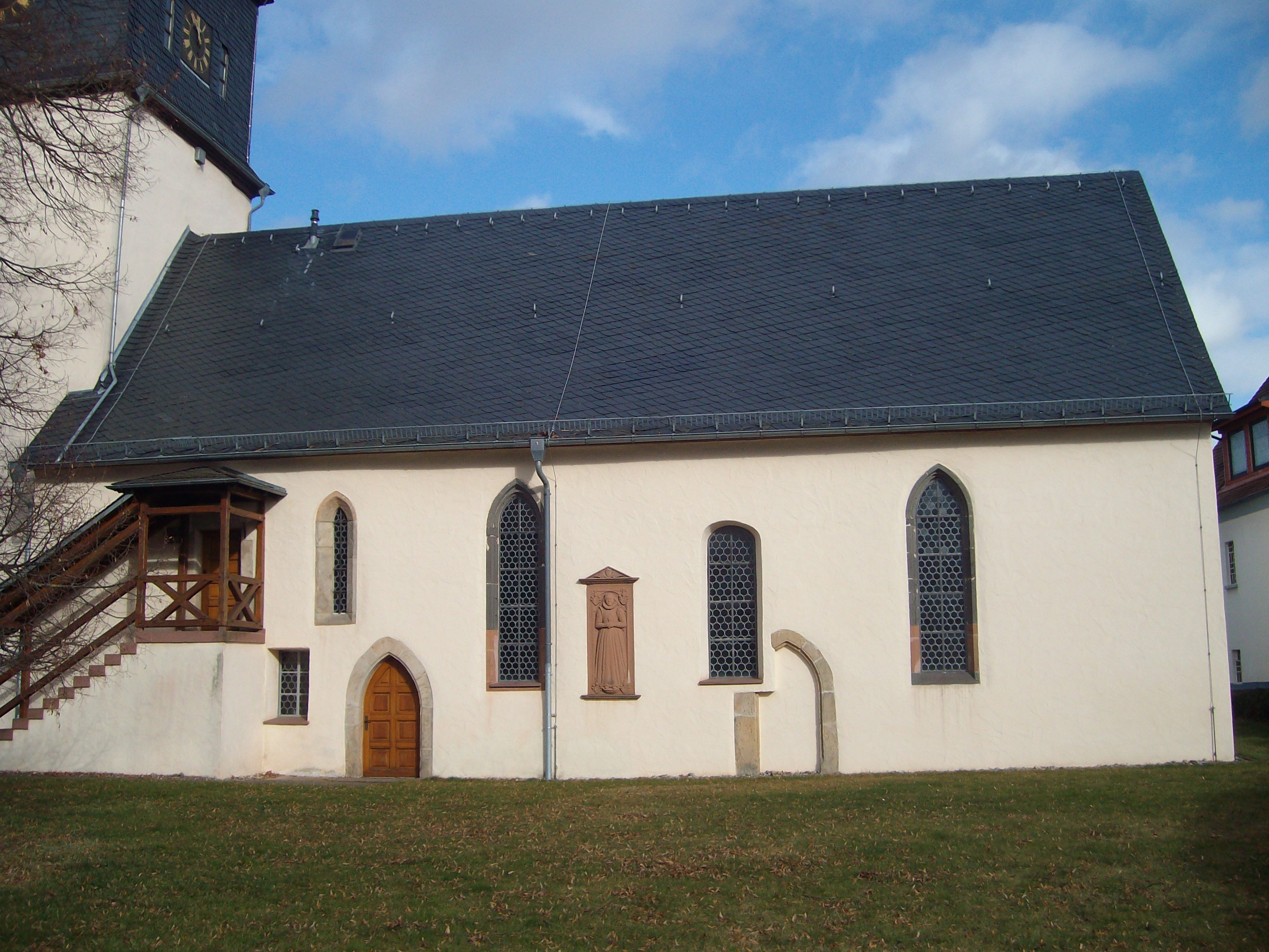 Evangelische Kirche Alten-Buseck, Hessen, Deutschland